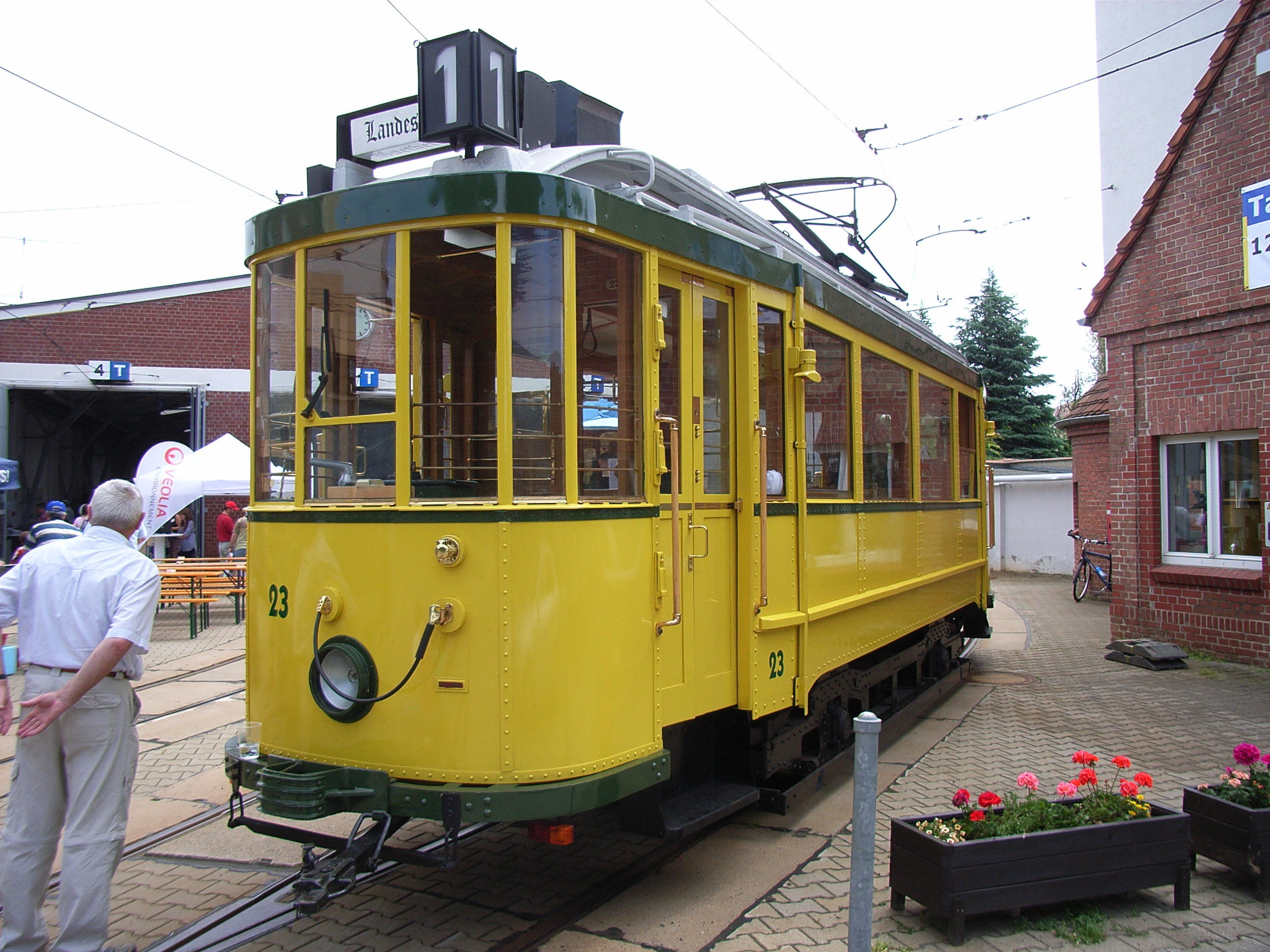 Historischer Wagen 23 der Görlitzer Straßenbahn